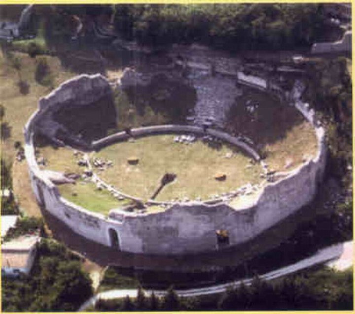 Veduta dall'alto dell'anfiteatro romano di Cassino